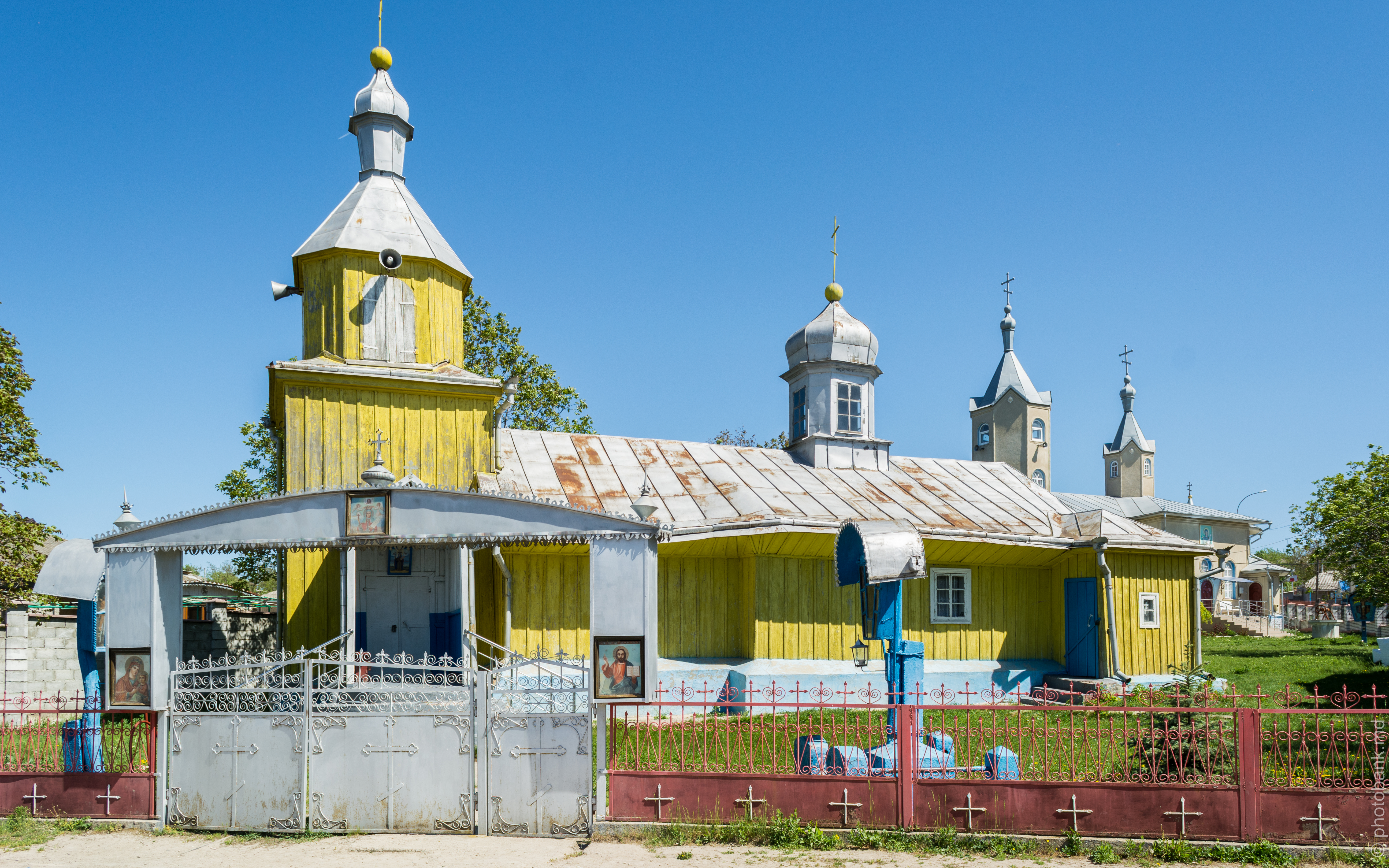 Сингурены, церковь Святой Параскевы / Biserica Sfinta Cuvioasa Parascheva din Singureni